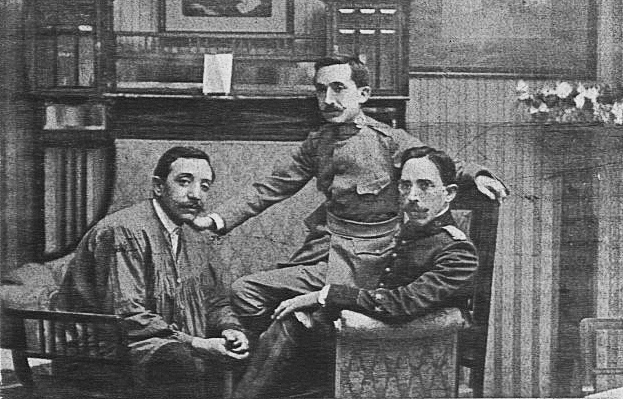 Presisto Emilio G. Linera, staba kapitano Fernando Redondo kaj infanteria kapitano Julio Mangada Rosenörn, fondintoj de "Homaro", "Hispana Esperantisto" kaj "Zamenhofa Federacio".